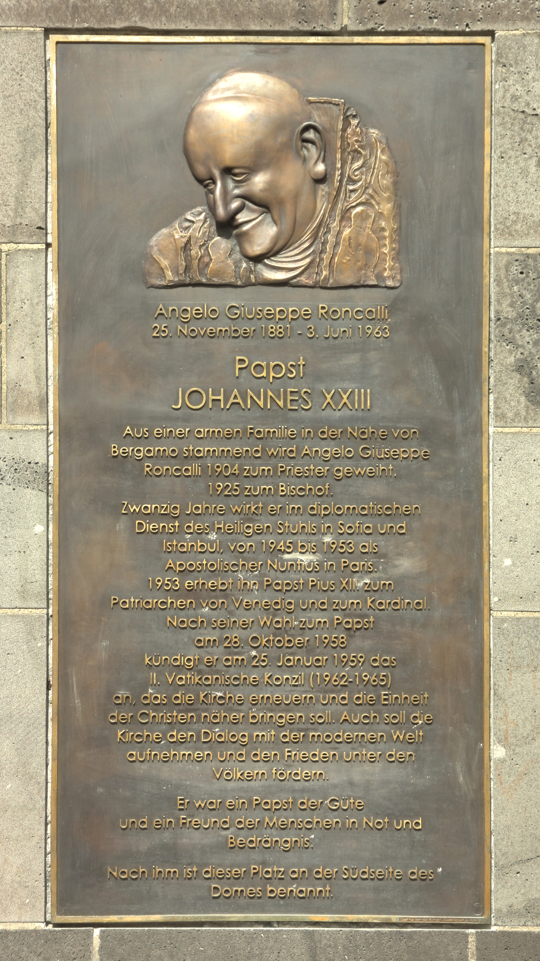 Tafel zum Andenken an Papst Johannes XXIII. Sie soll die Besucher darüber informieren, dass der Roncalliplatz nach Papst Johannes XXIII. benannt ist, der mit bürgerlichem Namen Angelo Guiseppe Roncalli hieß